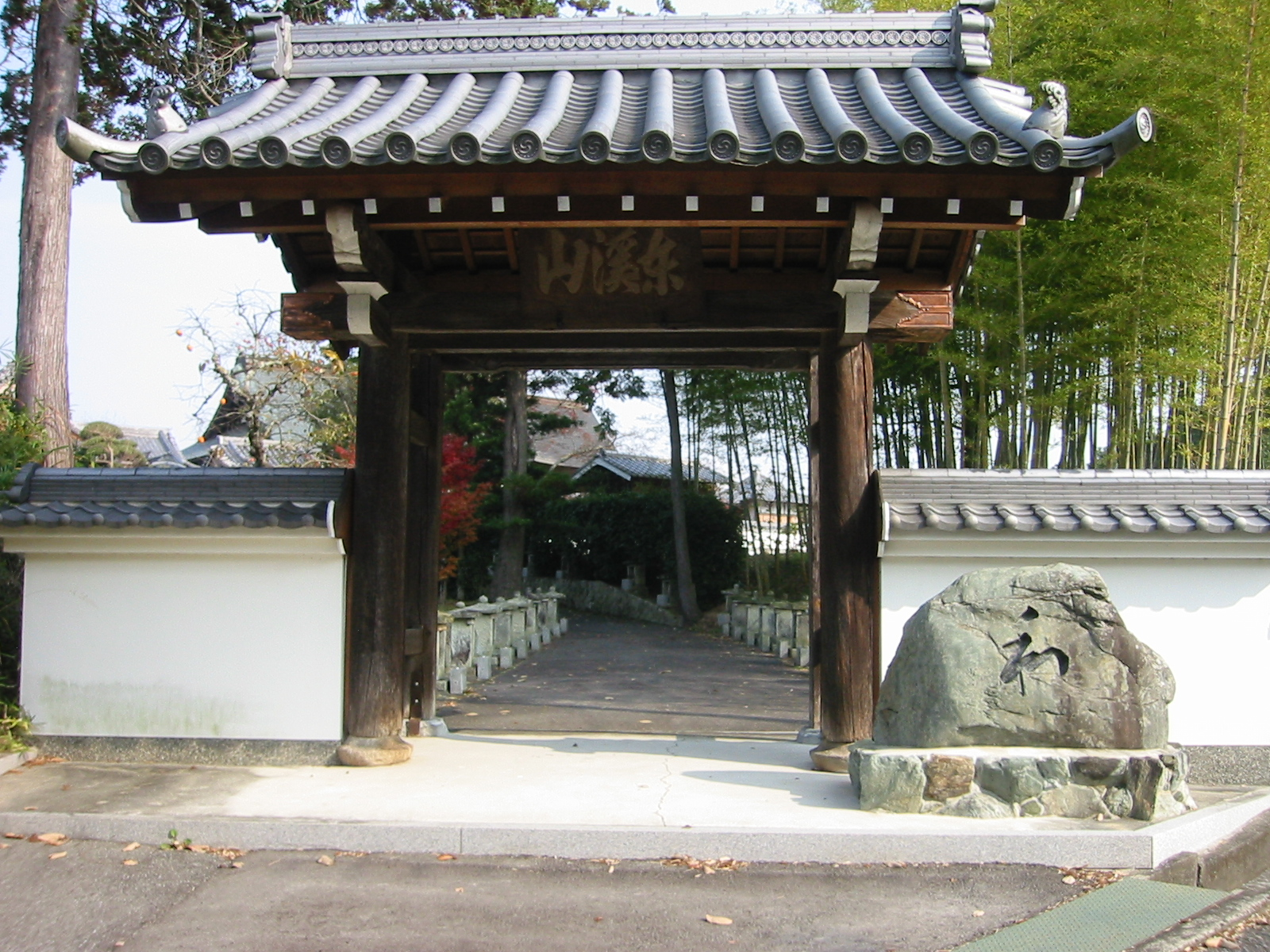 播磨 東条町 安国寺 山門